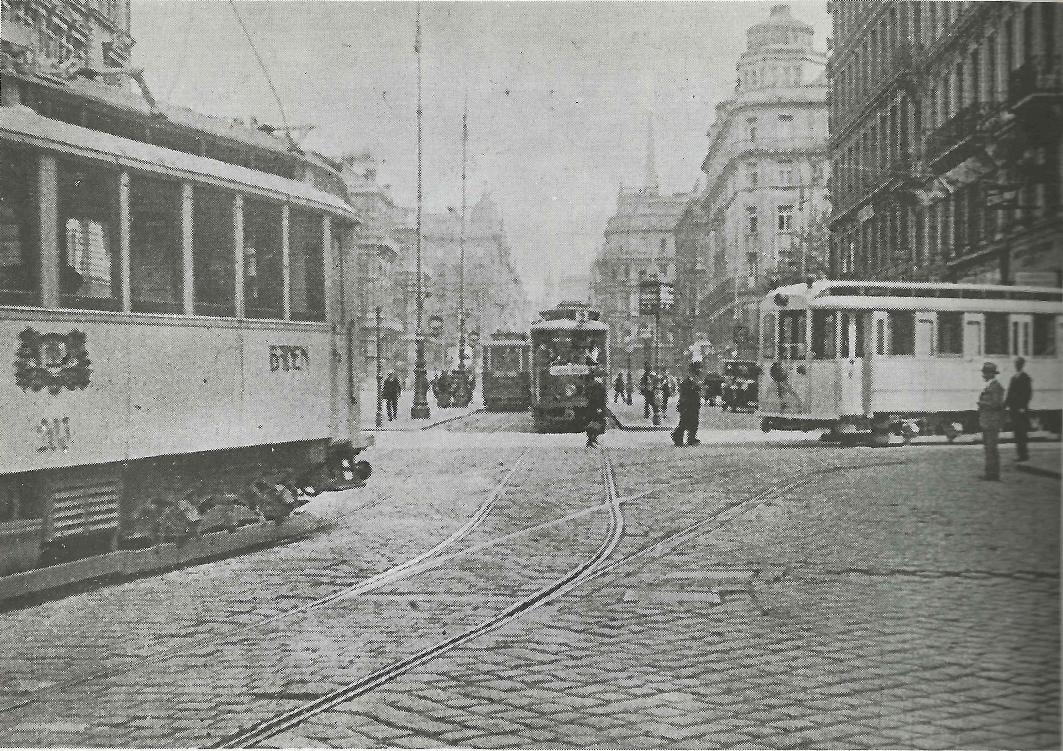 Loka Fervojo de Vieno al Baden proksime de la tiama viena finhaltejo